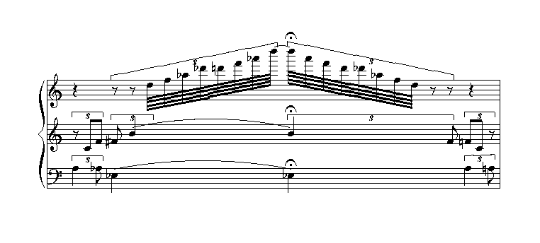 Partie centrale de la musique de film de Lulu d'Alban Berg